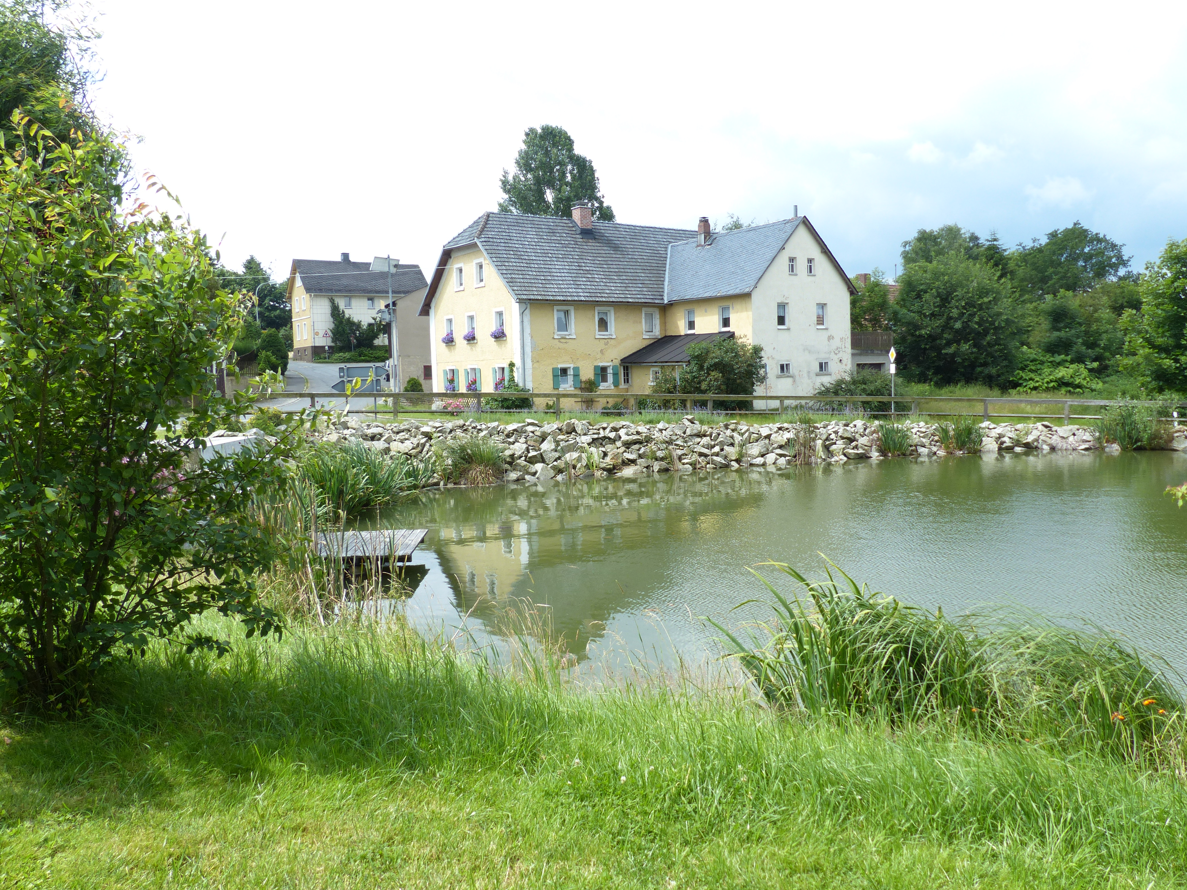 Baudenkmale von Fleisnitz